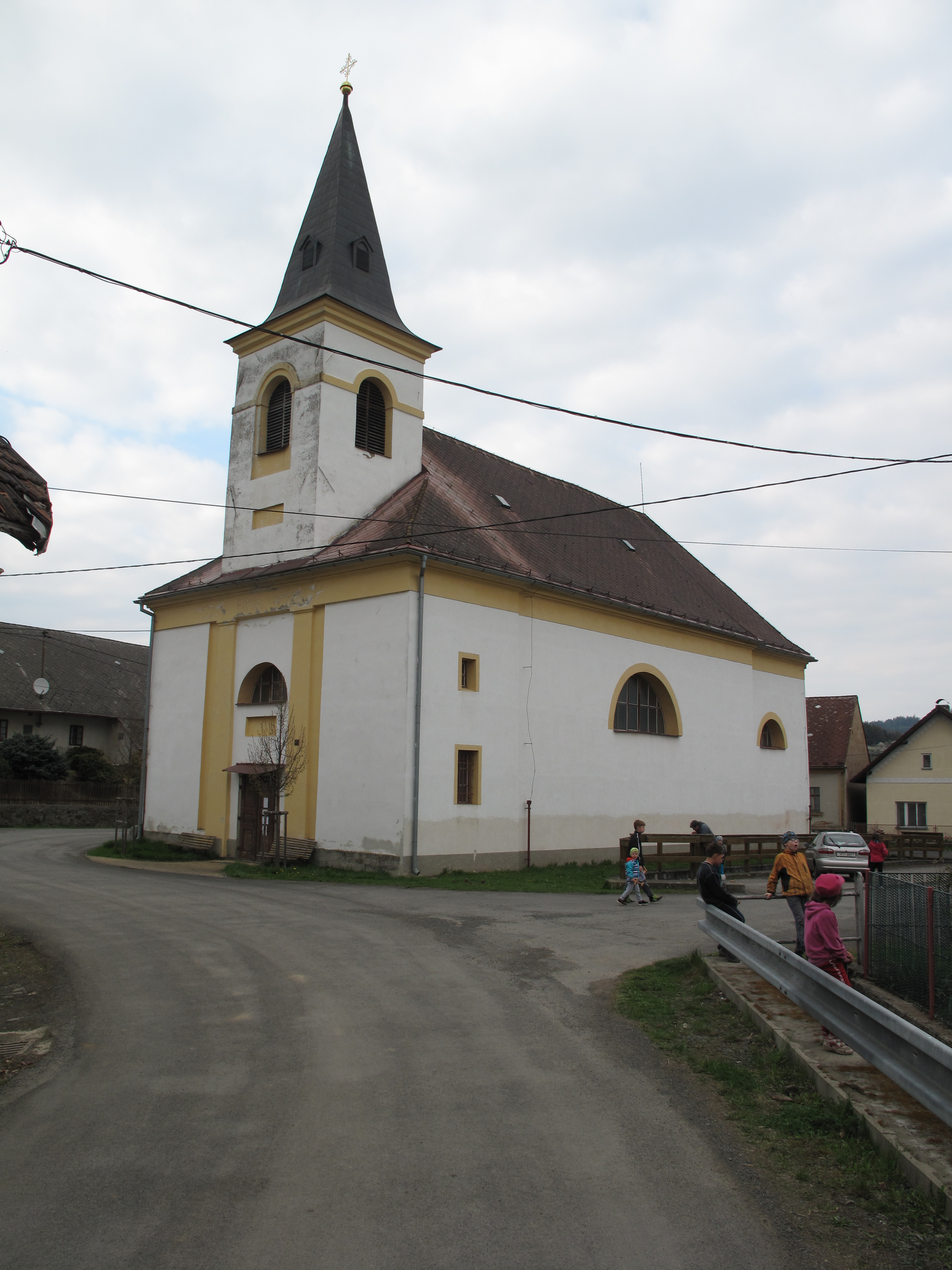 PSlavíkovice (Černíkov). Okres Klatovy, Česká republika.